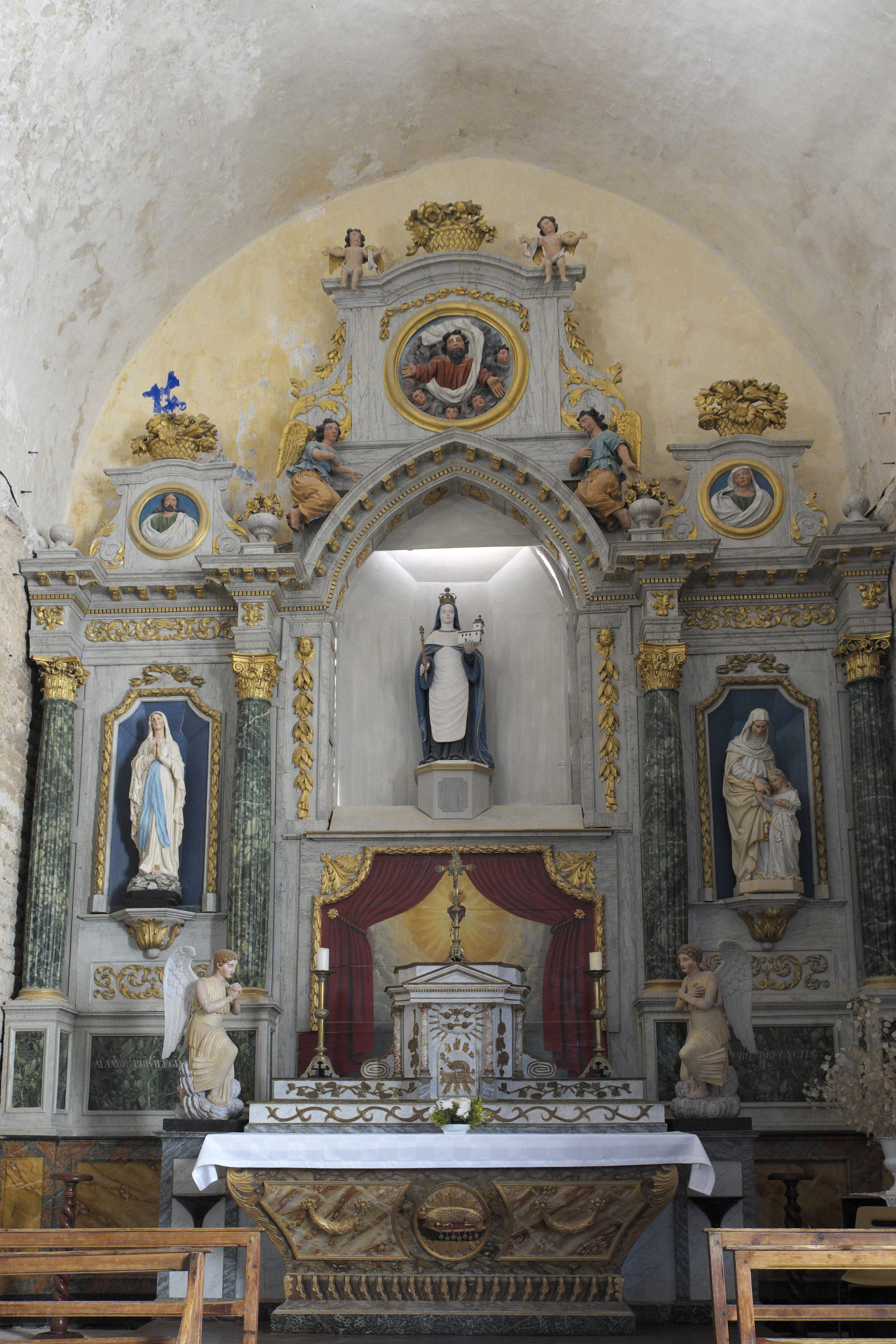 Katholische Kirche Sainte-Radegonde in Jard-sur-Mer im Département Vendée (Pays de la Loire/Frankreich), Innenraum